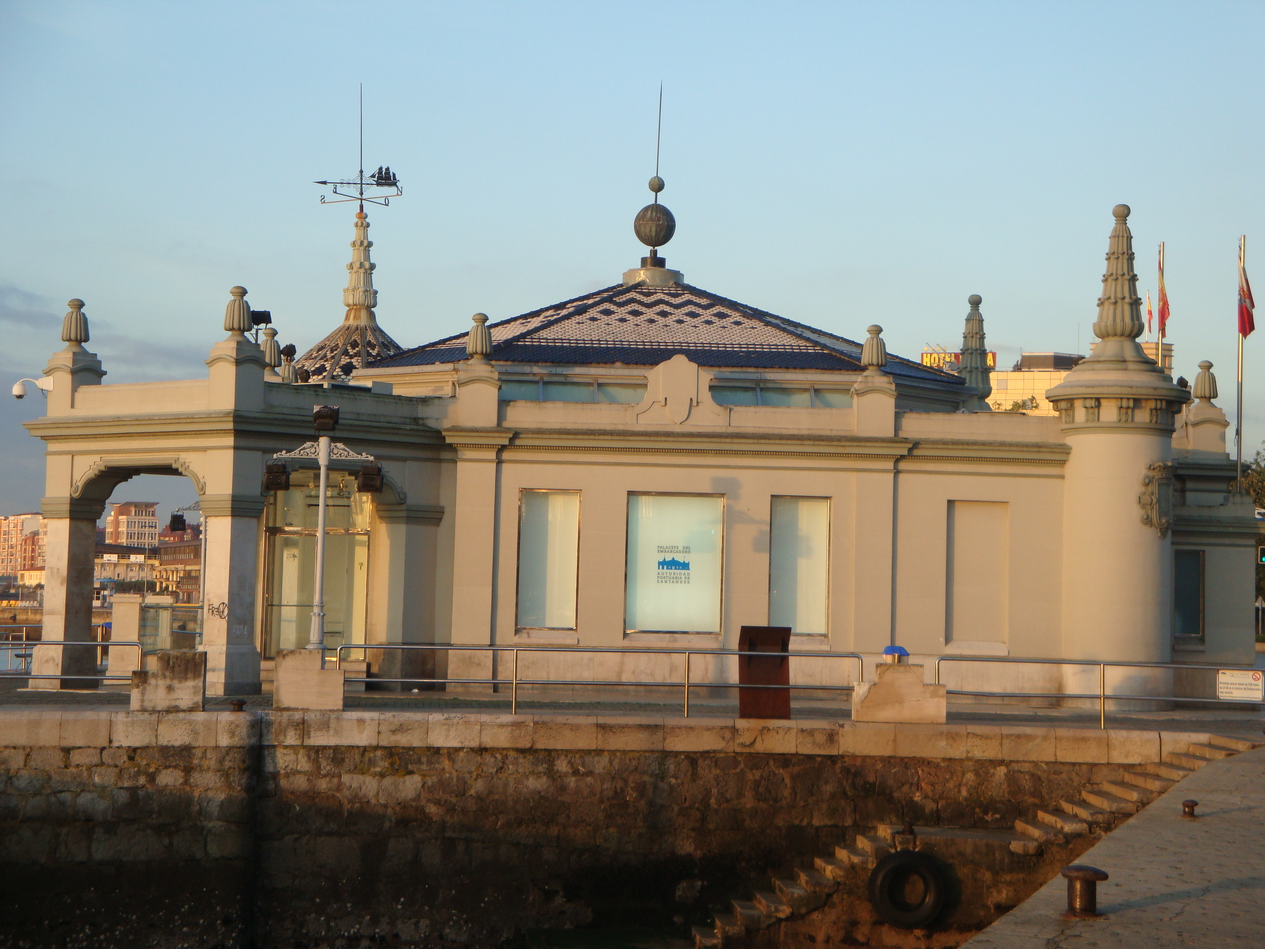 Palacete del puerto de Santander